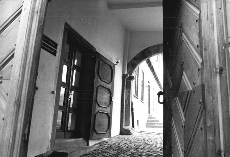 Halle, Händel-Haus ADN-ZB Grubitzsch 21.2.85 Halle: Das Händel-Haus in der Nicolaistraße wurde am 20.2.85 nach umfangreichen Rekonstruktion wieder eröffnet. Das Geburtshaus des großen Komponisten, das seit 1948 als Museum genutzt wird, präsentiert sich neugestaltet mit fast doppelter Ausstellungsfläche. Das Eingangstor zum Händelmuseum und zum Konzertsaal. - siehe auch Motive 1985-0221-25,26 und 28n